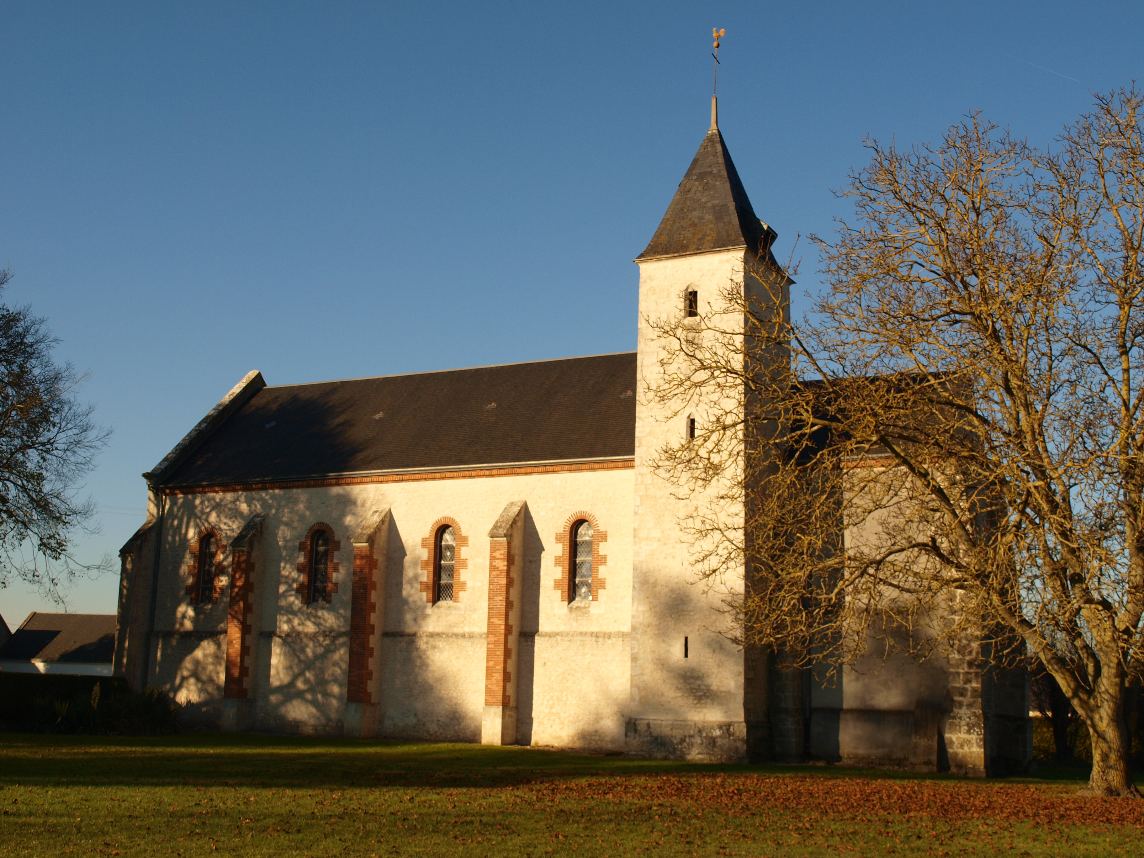 Gémigny (Loiret, France) ; église